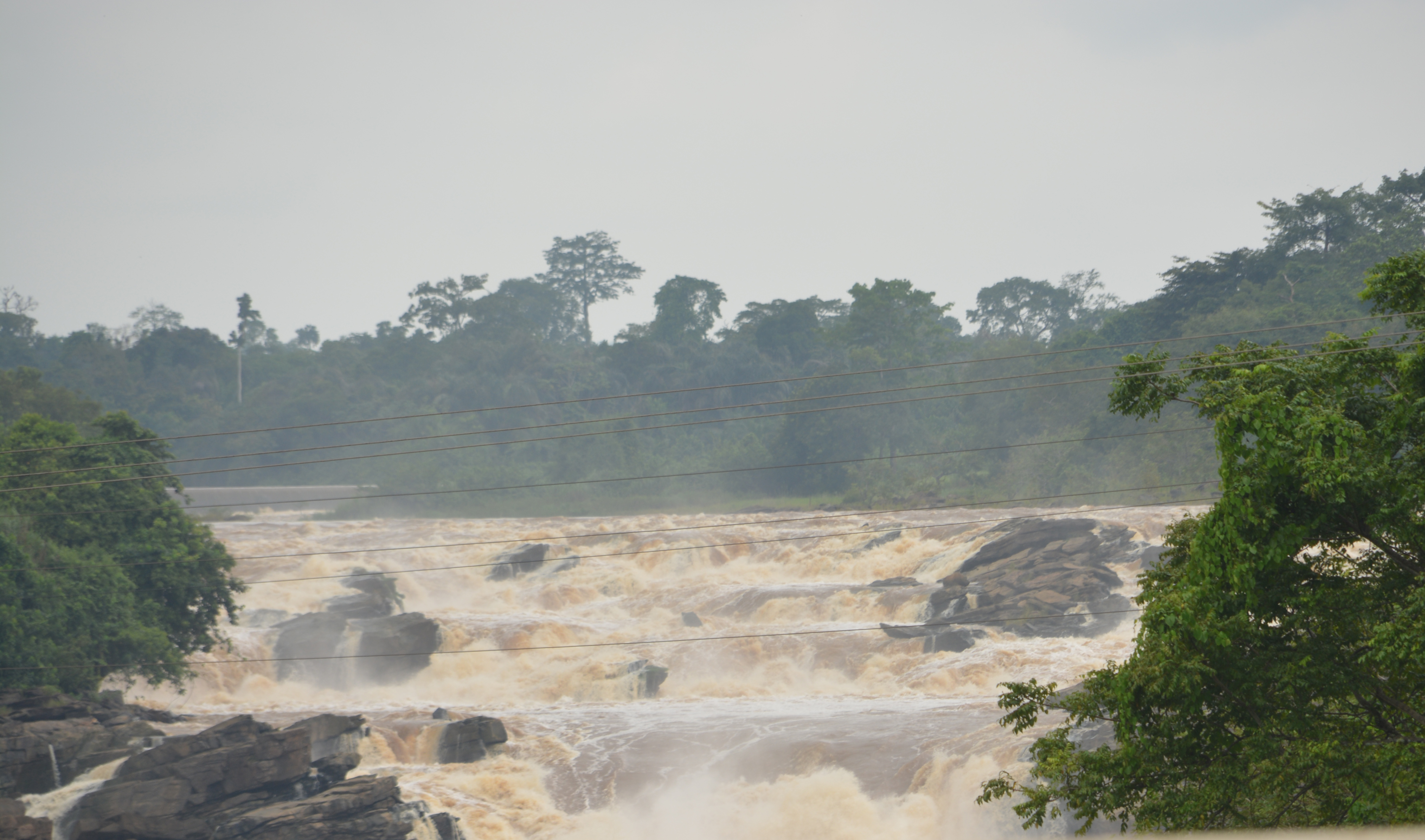 La rivière Sanaga